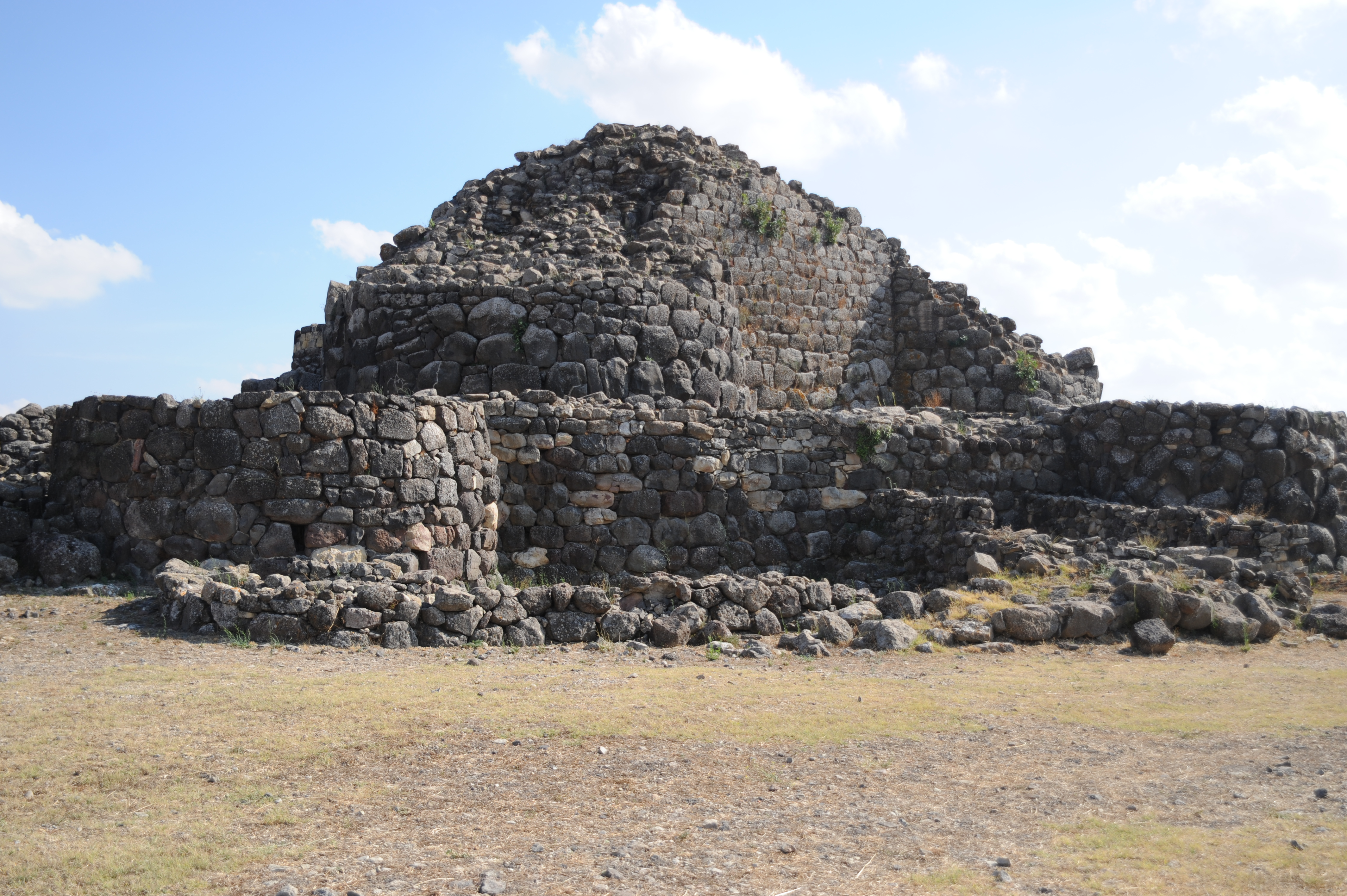 Site nuragique de Barumini Su Nuraxi en Sardaigne, Italie